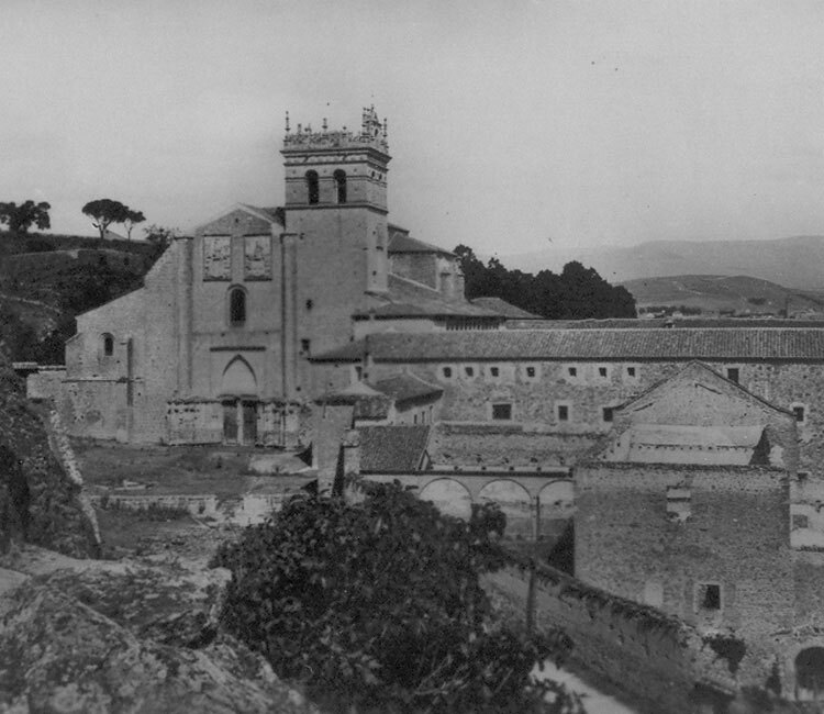 Monasterio del Parral - Segovia - Fotografía estereoscópica - Fotografía 130 x 60 B/N